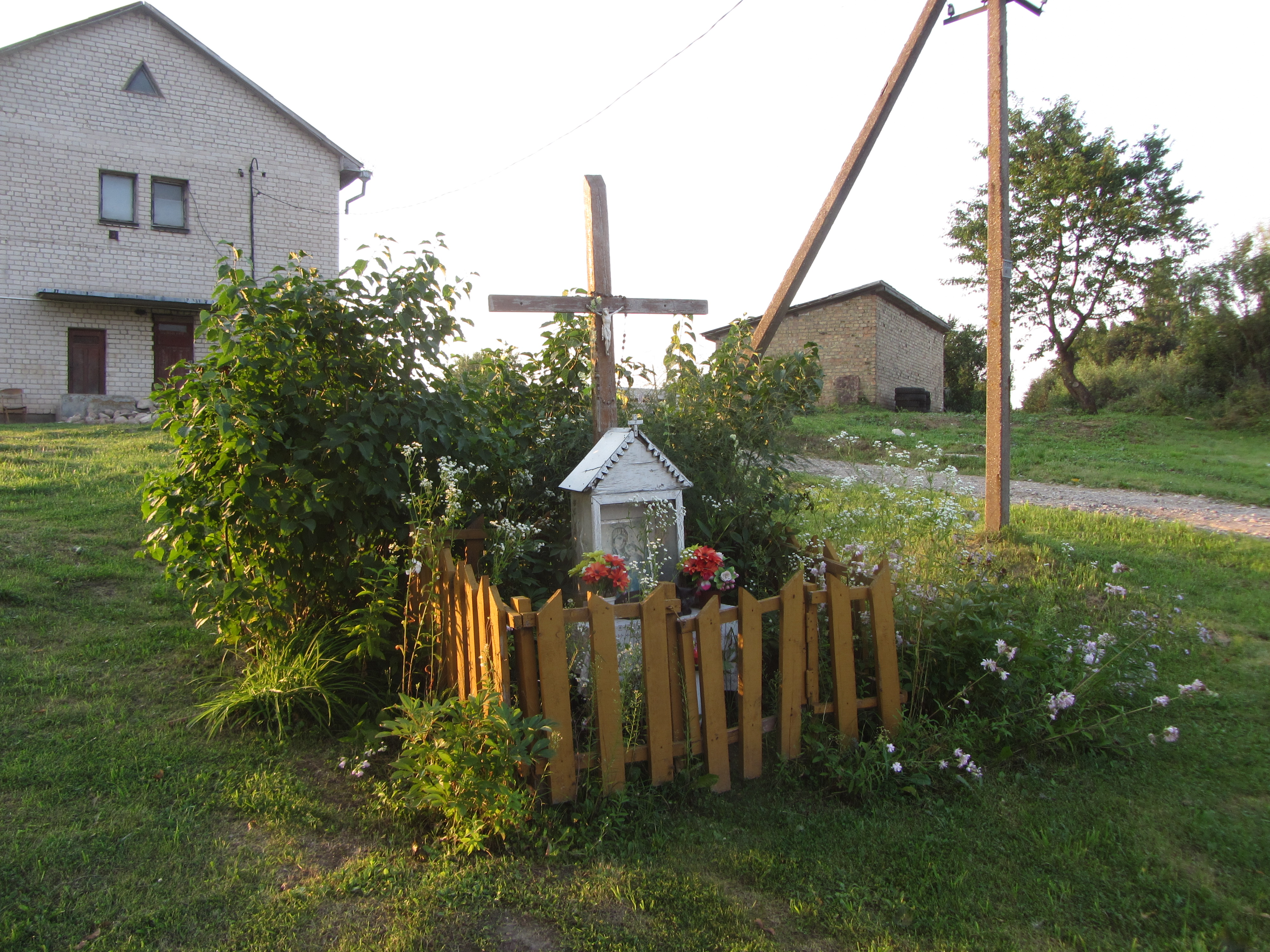 Vindžiūnai 13167, Lithuania